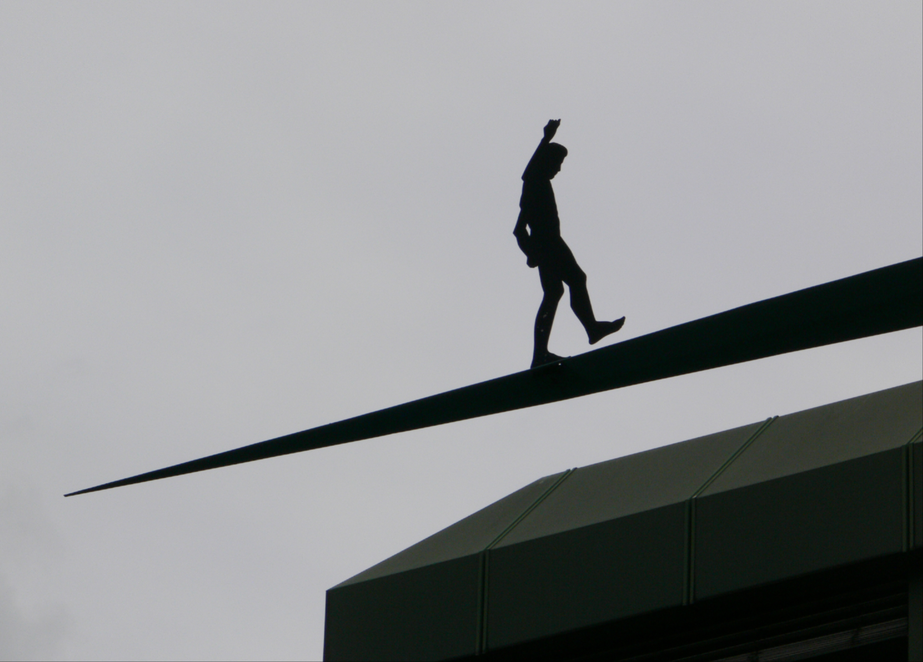 Kunsthalle Mannheim, Skulpturengarten, Hubertus von der Goltz: Aus dem Nichts, 1992/93, Aluminium, farbig gefasst